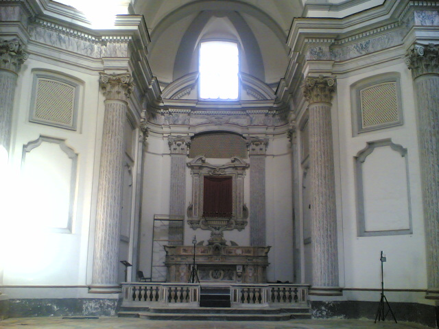 Interno, Santa Maria delle Grazie, Napoli